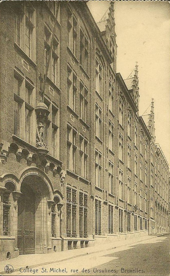 2ème Collège Saint Michel, site de la rue des Ursulines. Porte d'entrée des élèves. Fin XIXème, début XXème siècle.